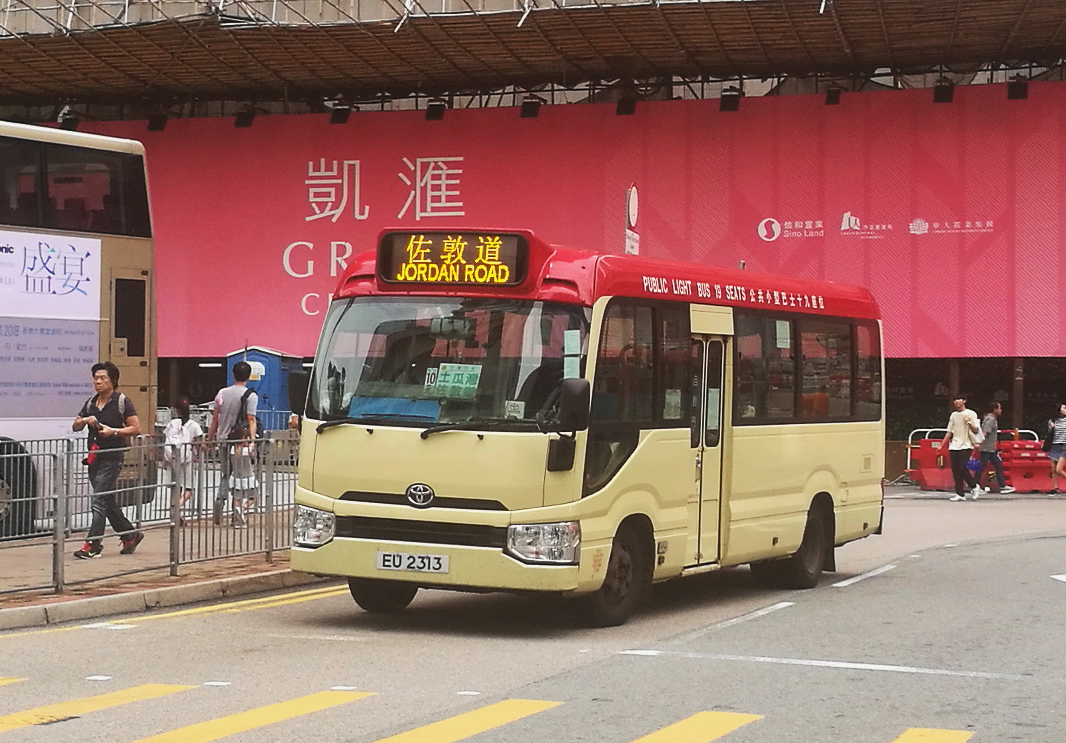 小巴EU2313的照片